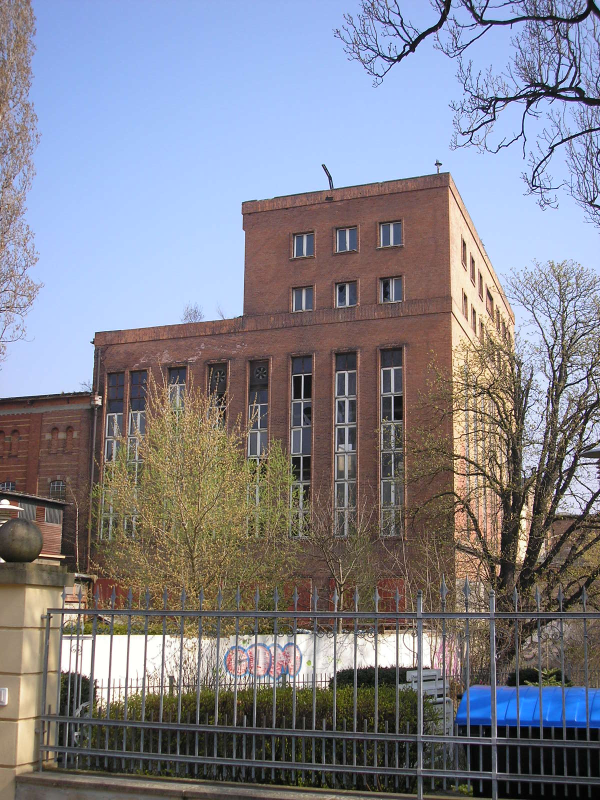 Teil des historischen Kraftwerks in Erfurt-Gispersleben (Thüringen). Der gesamte Gebäudekomplex wurde im Jahr 2016 komlett abgerissen.